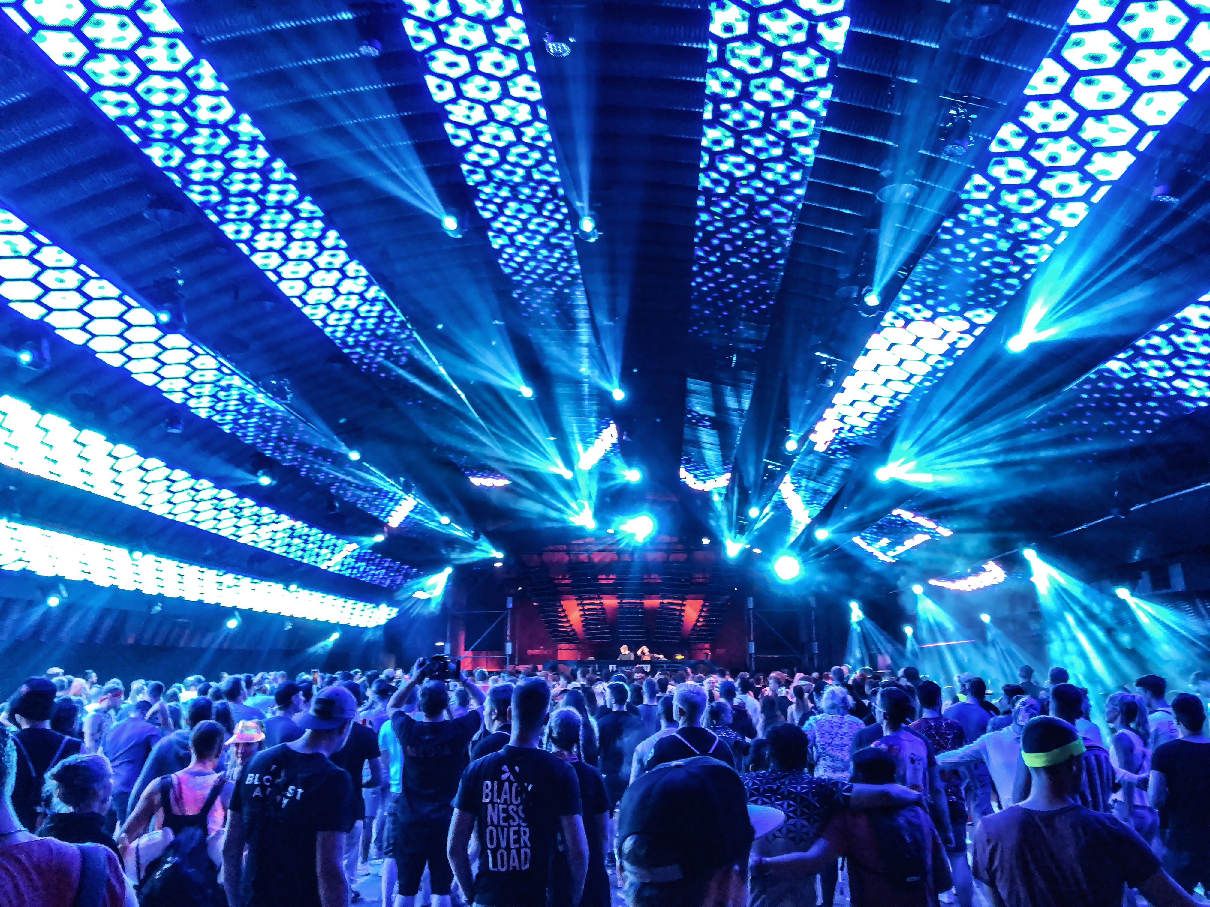 Time Lab Parookaville 2019